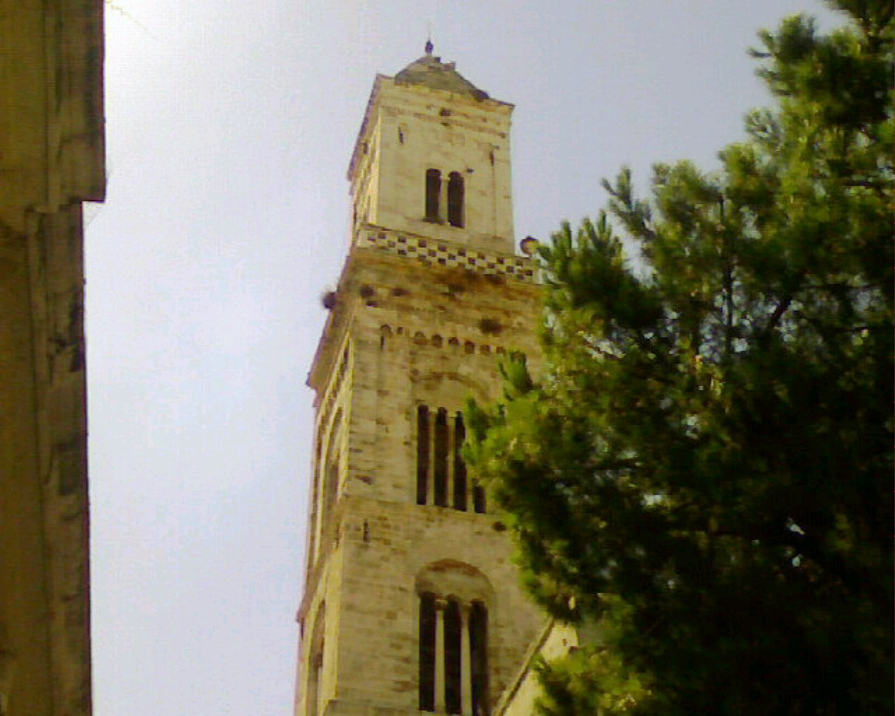 campanile-modugno